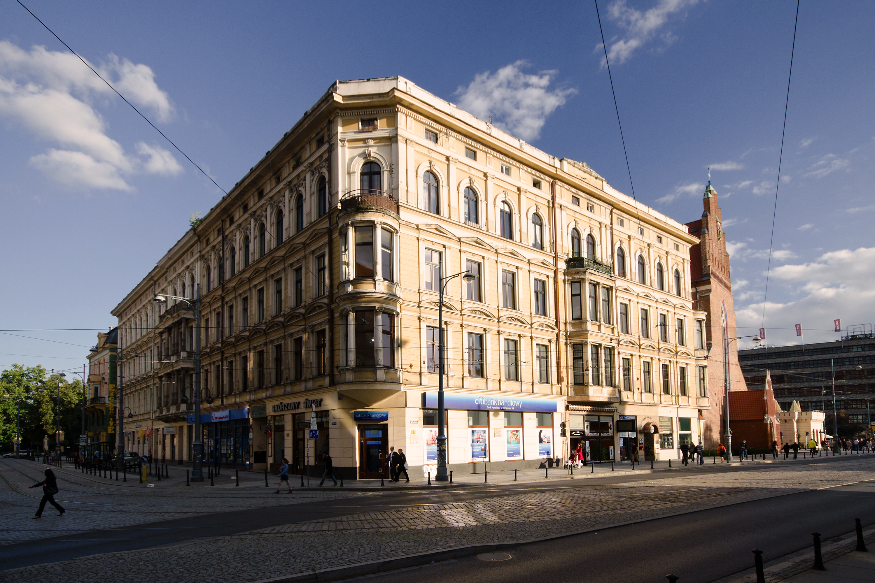 Kamienica Świdnicka 36/pl. Teatralny 1, Miasto Wrocław - Stare Miasto